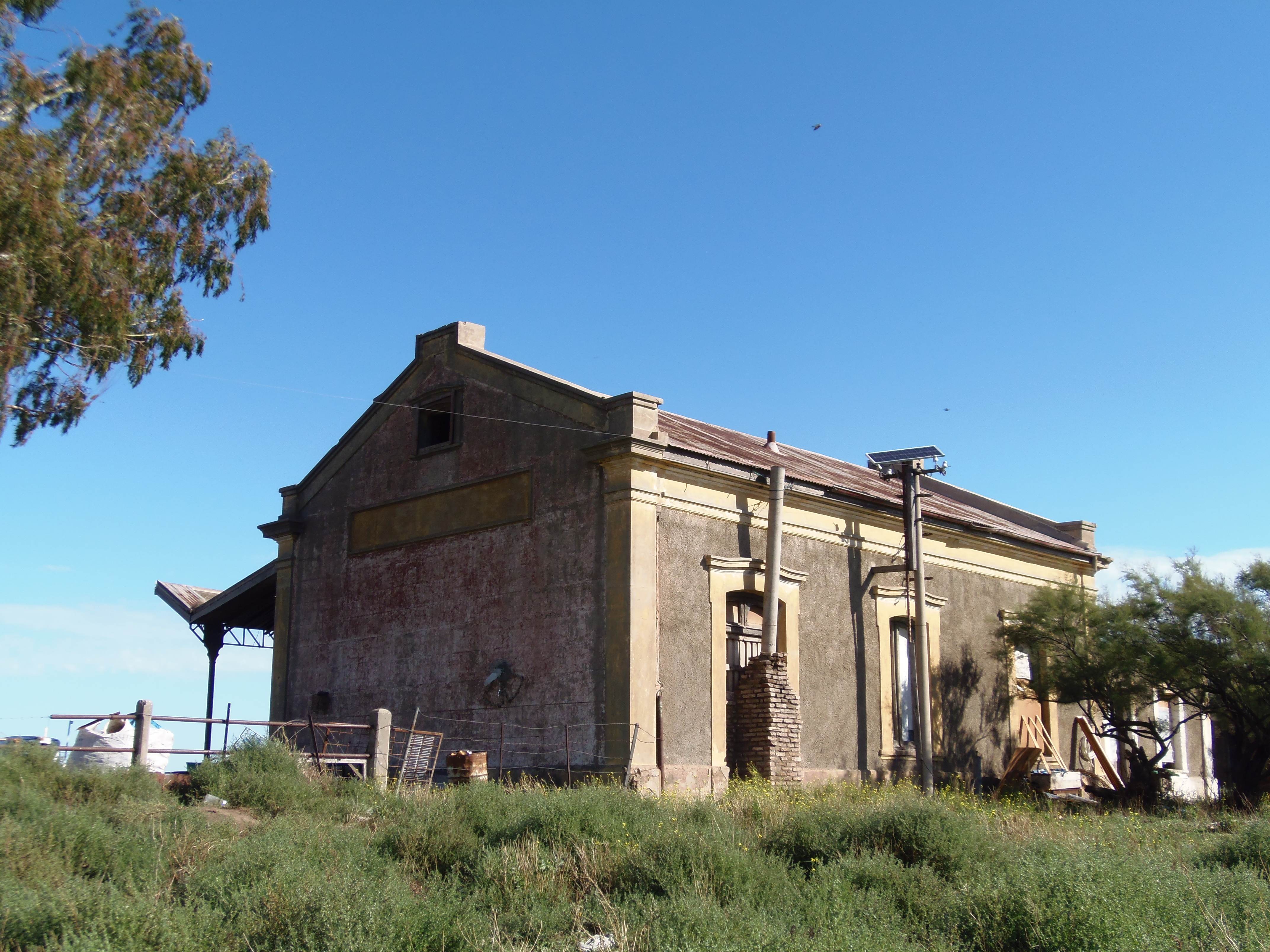 Vieja Estacion Ferroviaria de Paso Mayor.